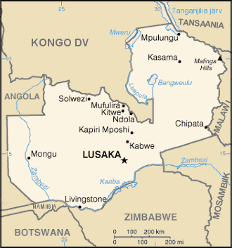 Sambia kaart